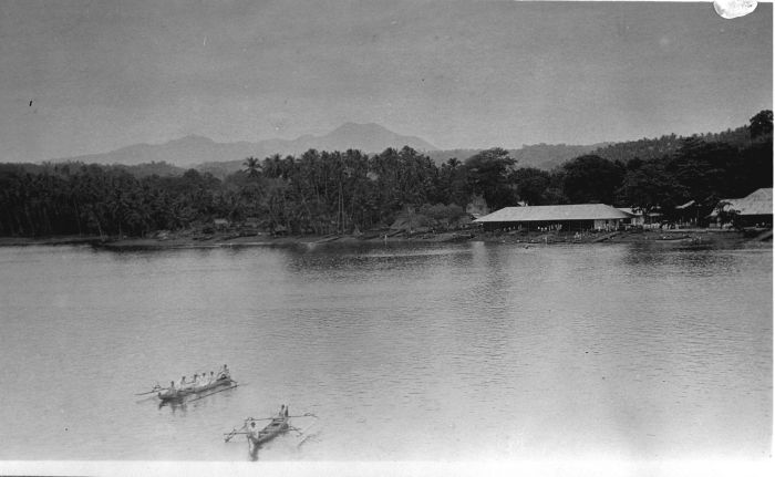 Foto. Amurang gezien vanuit de Amurang baai